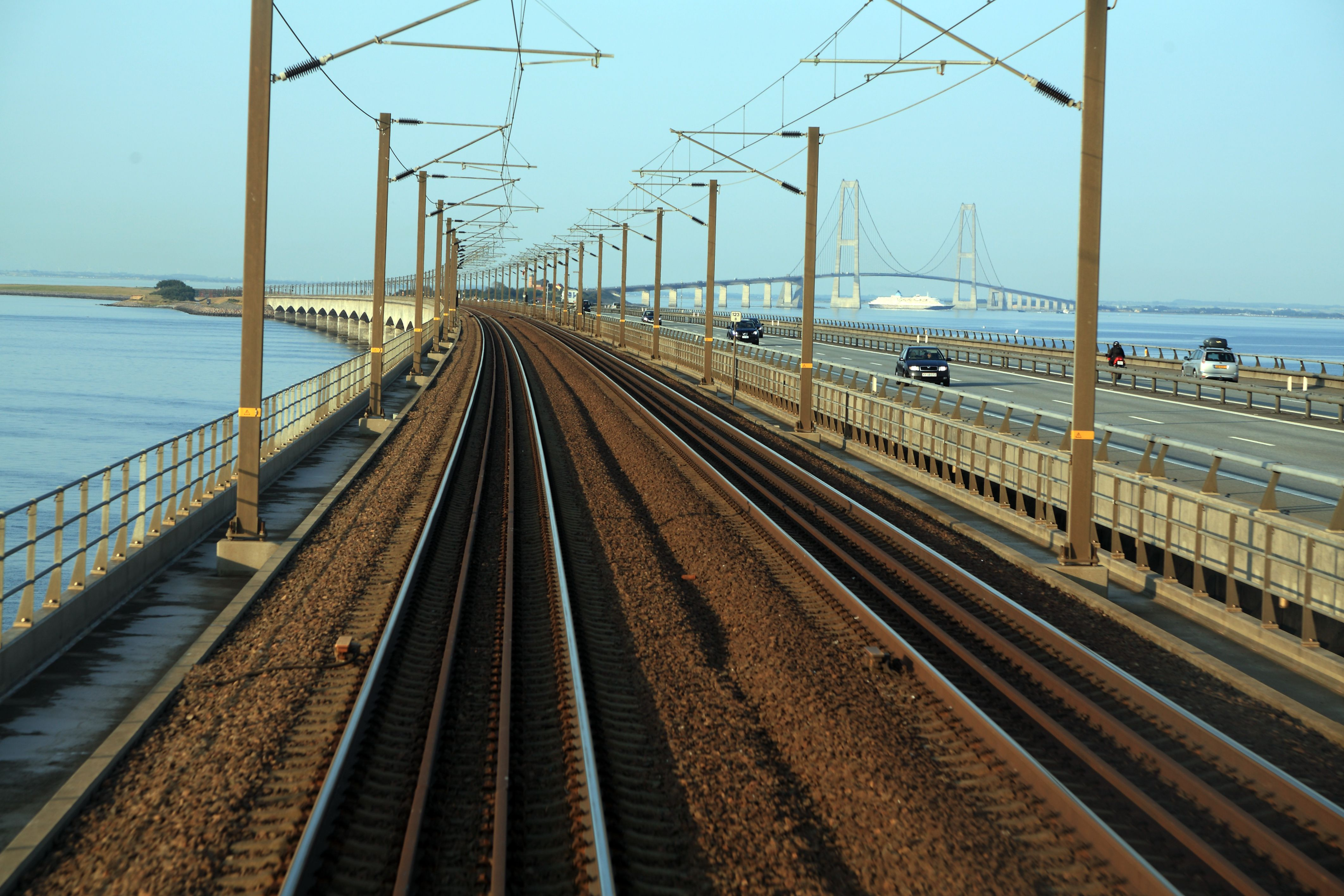 Fahrbahn des Westbrückenzuges, dahinter Sprogø und die Ostbrücke